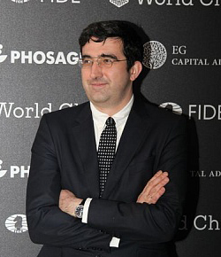 Турнир Претендентов 2018, Владимир Крамник